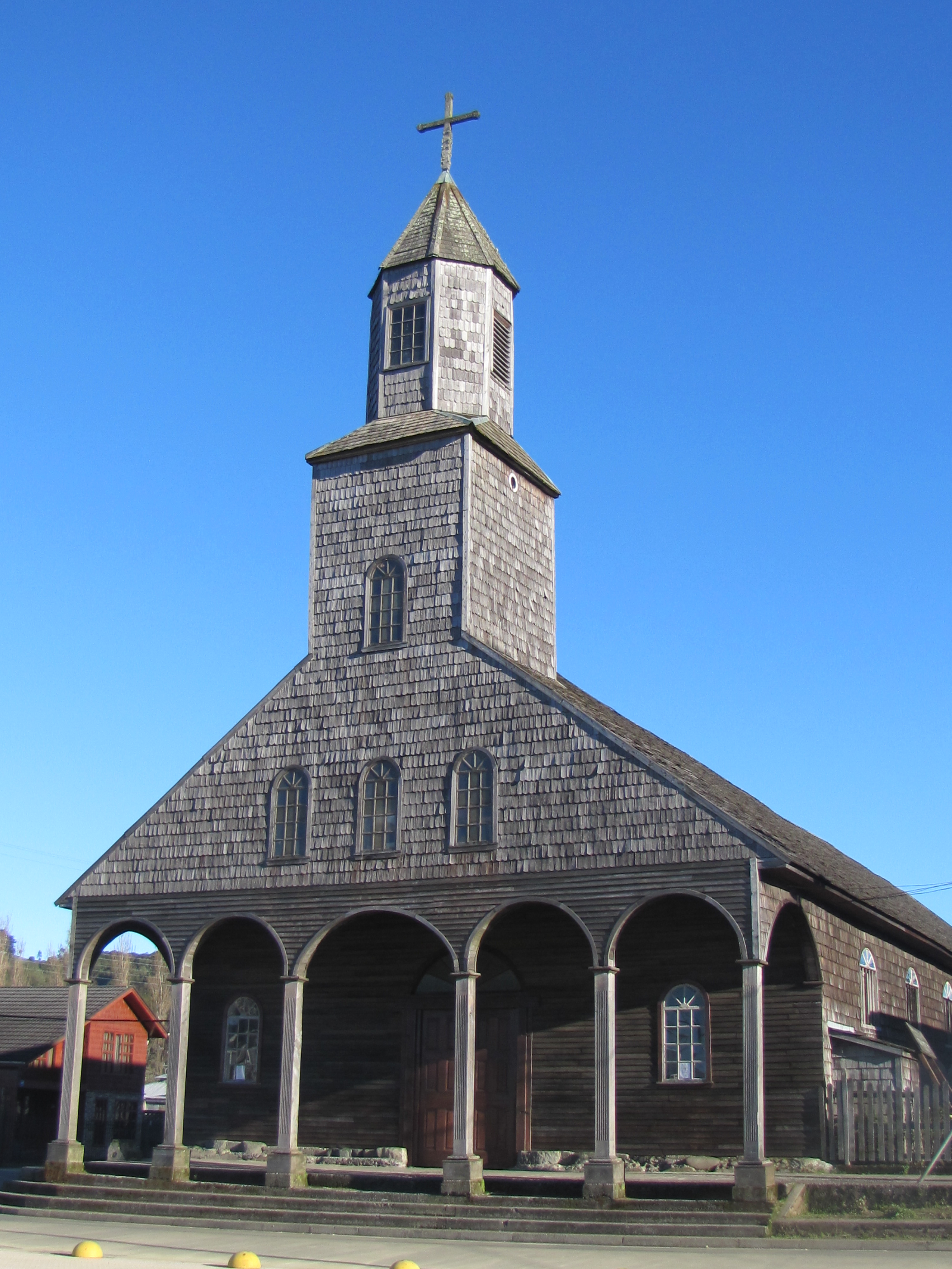 Iglesia Santa María de Loreto de Achao, comuna de Quinchao, archipiélago de Chiloé, Chile This is a photo of a national monument in Chile: 166